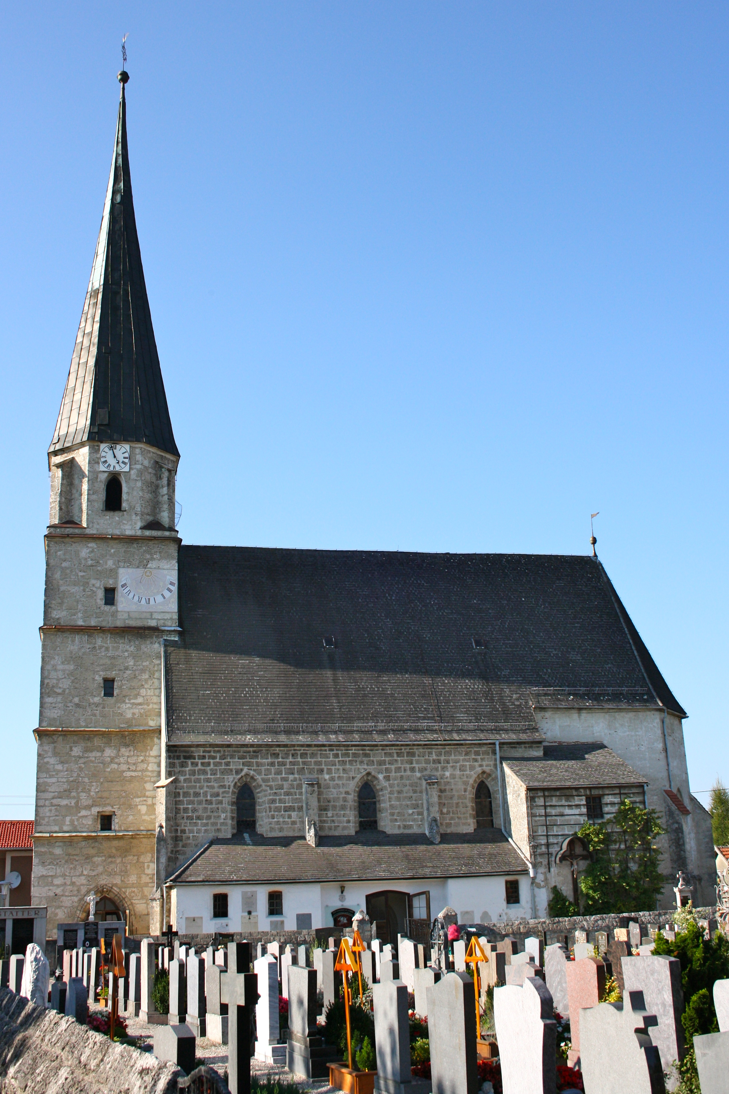 Kath. Pfarrkirche hl. Johannes der Täufer in Schwand im Innkreis. Object location48° 10′ 44.9″ N, 12° 58′ 06.27″ E